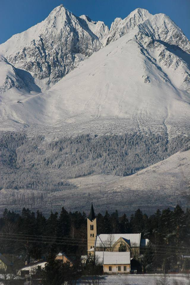 Kostol sv. Jana krstitela v Mlynčekoch v zime